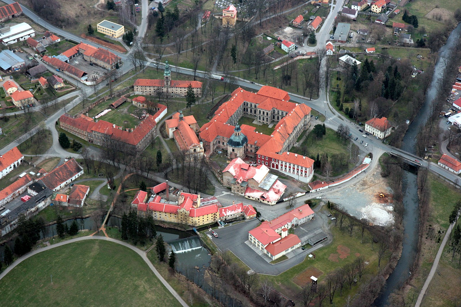 Areál cisterciáckého kláštera v Plasích. V levém dolním rohu je východní konec Velké louky, mezi řekou Střelou a dnešní silnicí 27 se nachází zleva hospodářský dvůr, prelatura, za ní sýpky s gotickou Královskou kaplí, dále kostel Nanebevzetí Panny Marie přiléhající k mohutné budově konventu s kaplí sv. Benedikta. V pozadí je vidět kostel sv. Václava.